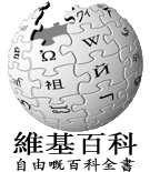 zh-yue Wikipedia Logo